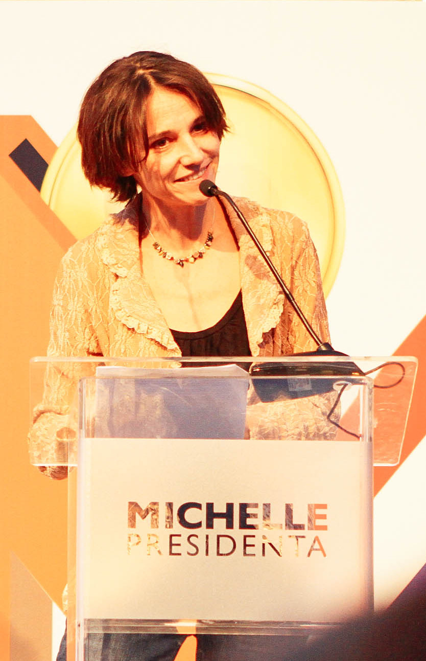 Aline Kuppenheim, actriz chilena.